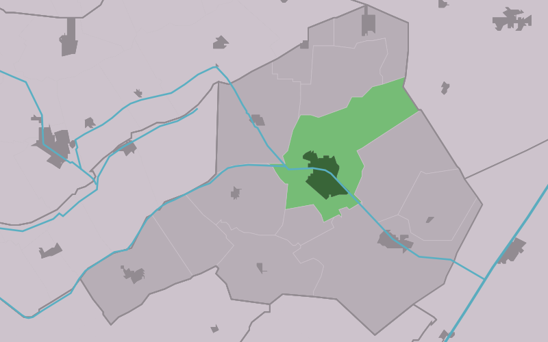 Kaartsje fan himrik fan Easterwâlde